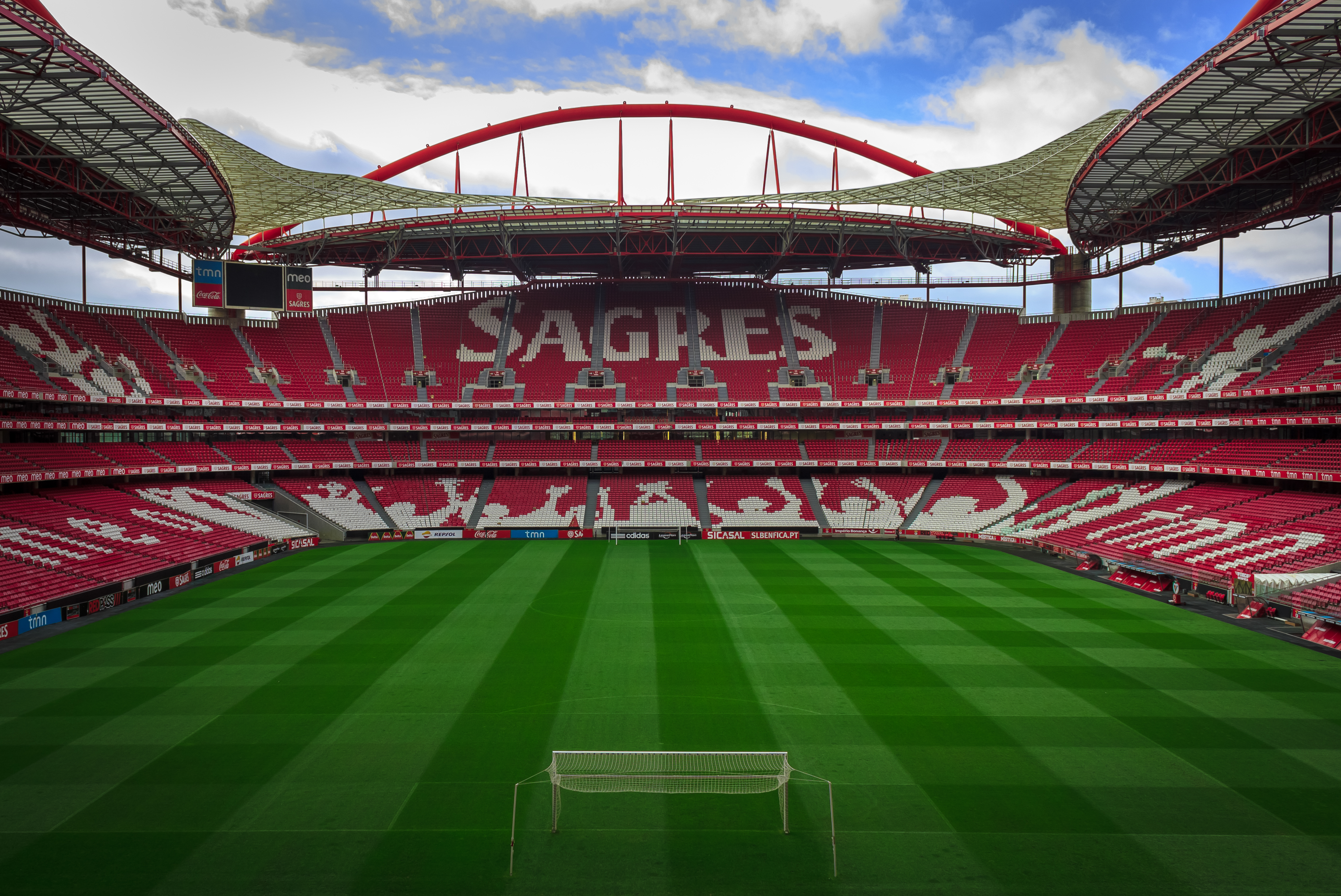 Benfica's Estádio da Luz in Lisbon, Portugal